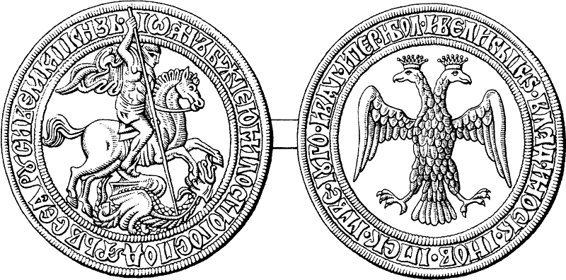 Печать Ивана III Васильевича (конец XV века, предположительно датируется 1489 годом) с перечислением его титулов, Святым Георгием и двуглавым орлом. На аверсе написано: «Иѡанъ Б[о]жiею милостію Господарь всеѧ Рꙋси Великыі кн[я]зь·», а на реверсе — «·И Великы кн[я]ѕ ·Влад[имирский] ·и Моск[овский] ·і Нов[городский] ·і Пск[овский] ·і Тве[рской] ·і Уго[рский] ·и Вят[ский] ·и Пер[мский] ·и Бол[гарский]»